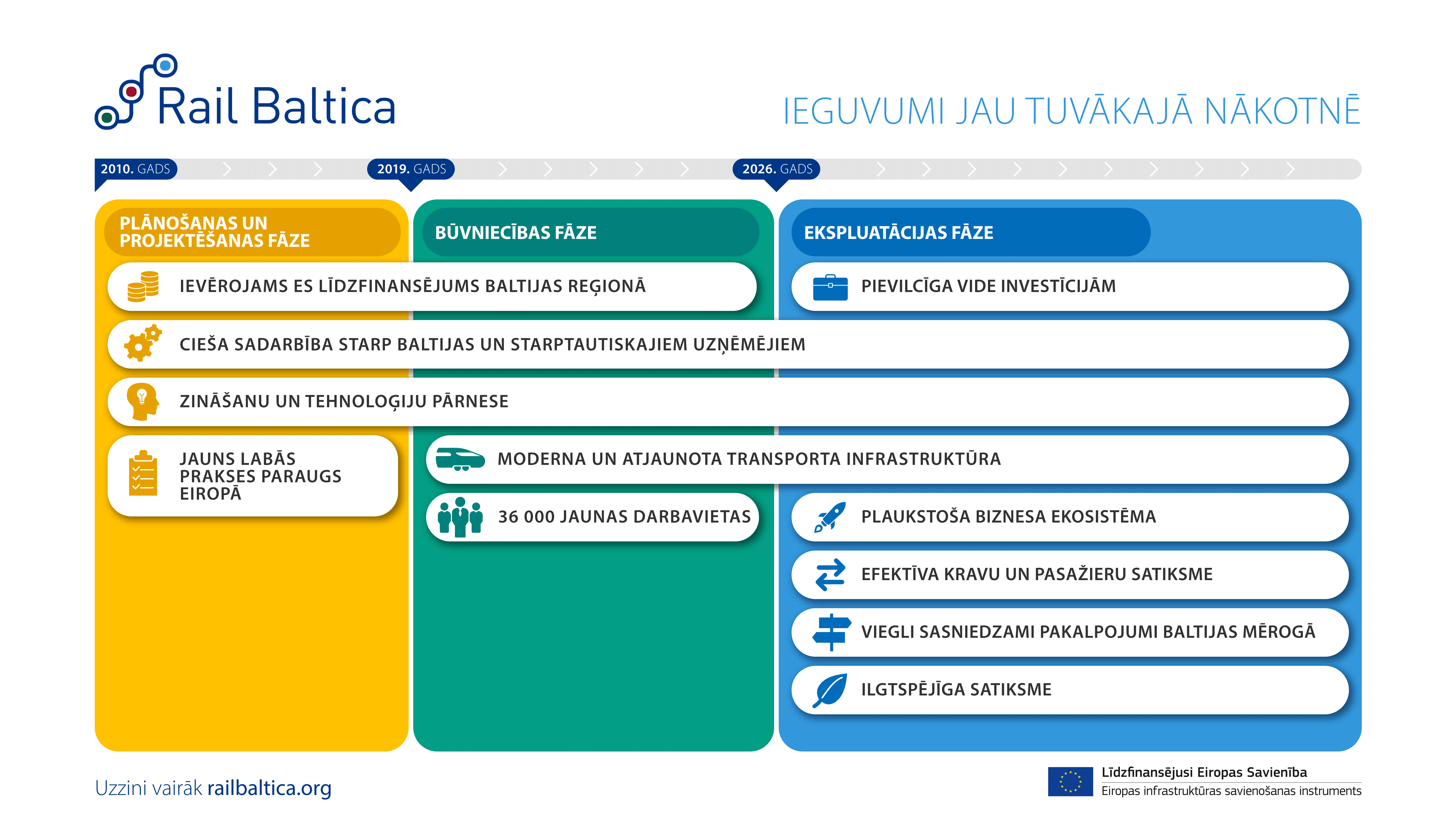 Rail Baltica projekta laika skala